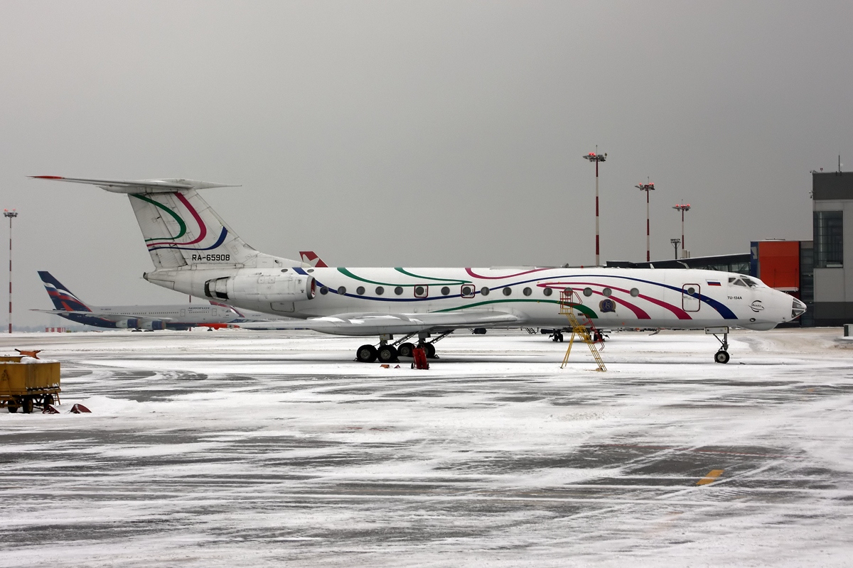 RusAir Tupolev Tu-134AK